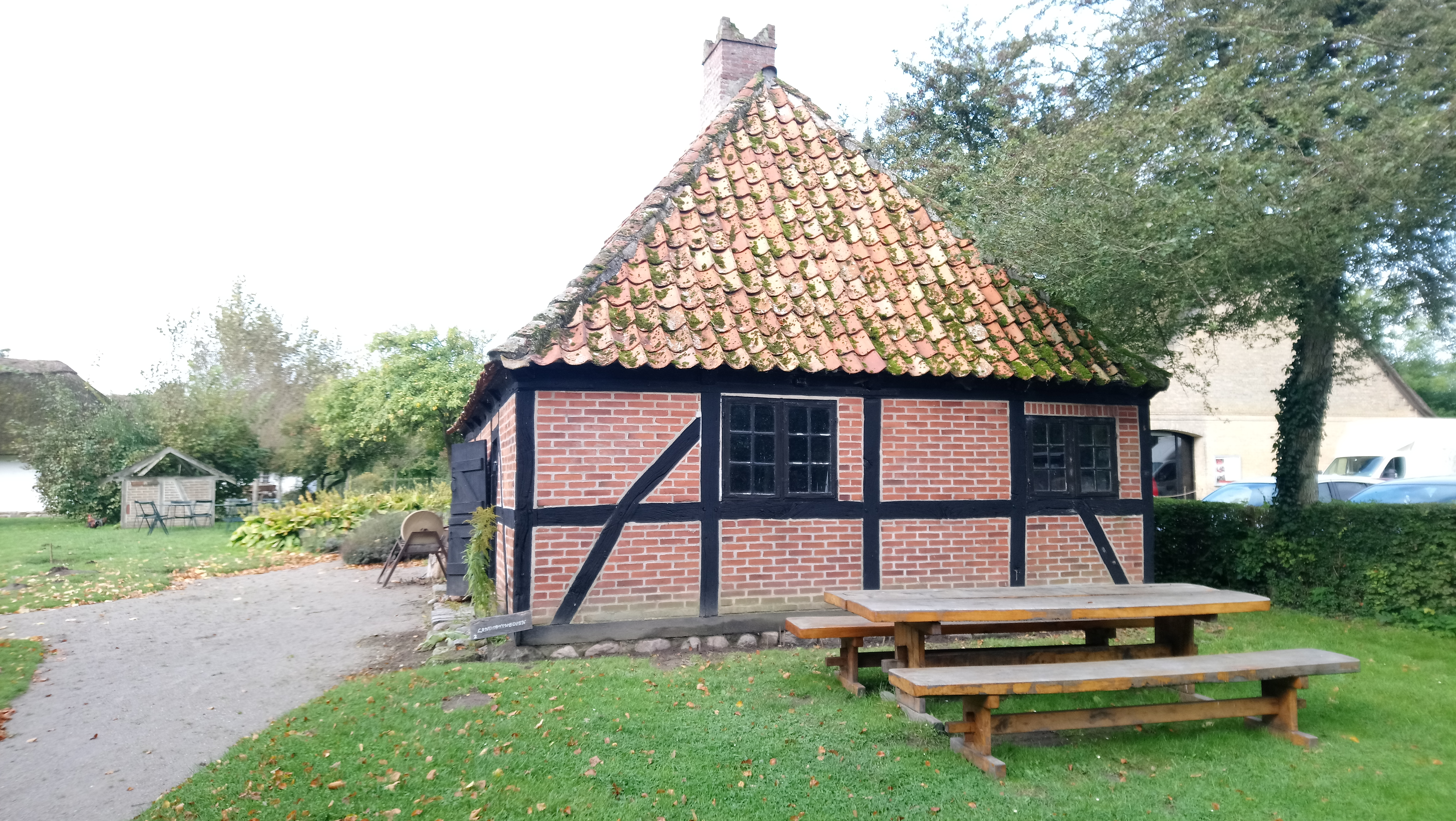 Fra begyndelsen af 1800-tallet. Kom til museet i 1927.